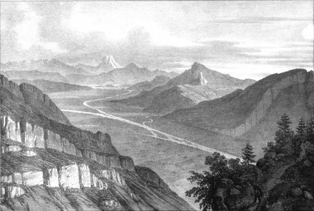 Album du Dauphiné - tome IV, lithographie de la vallée du Gresivaudan, vue prise de la Chartreuse de Chaley